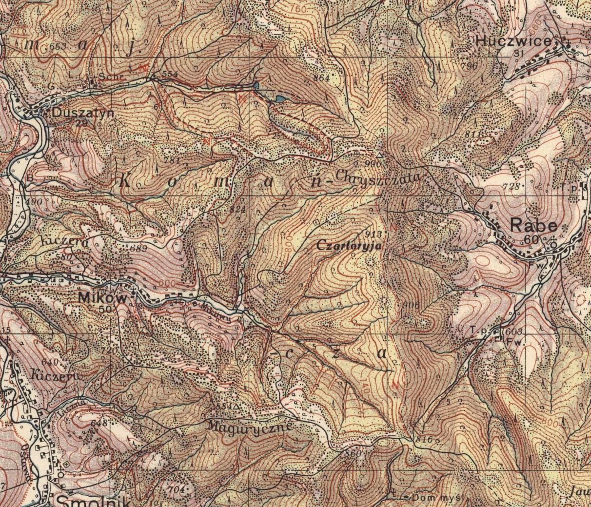 one piece Komańcza district map (1937)